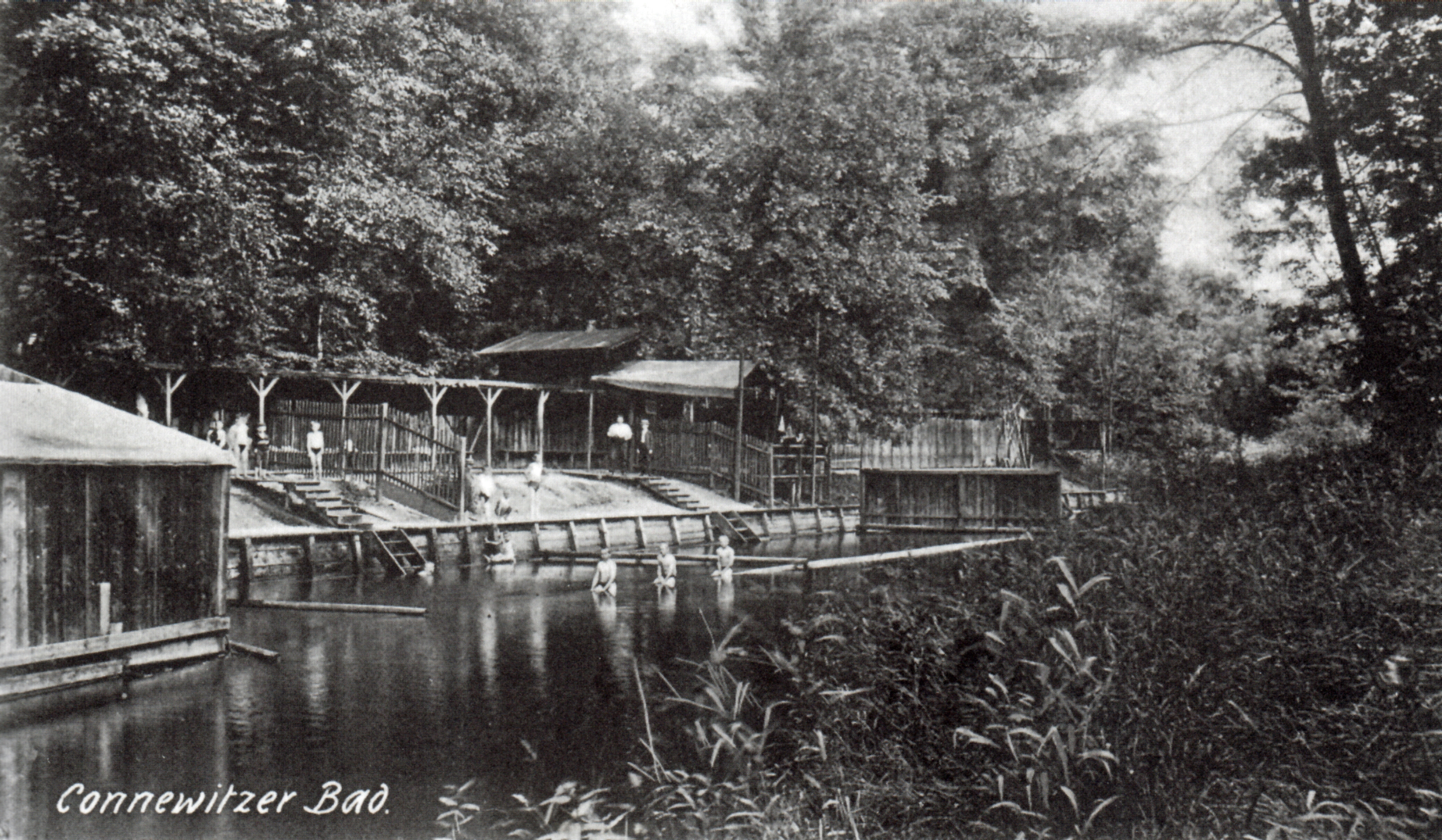 Das Connewitzer Flussbad an der Pleiße um 1920